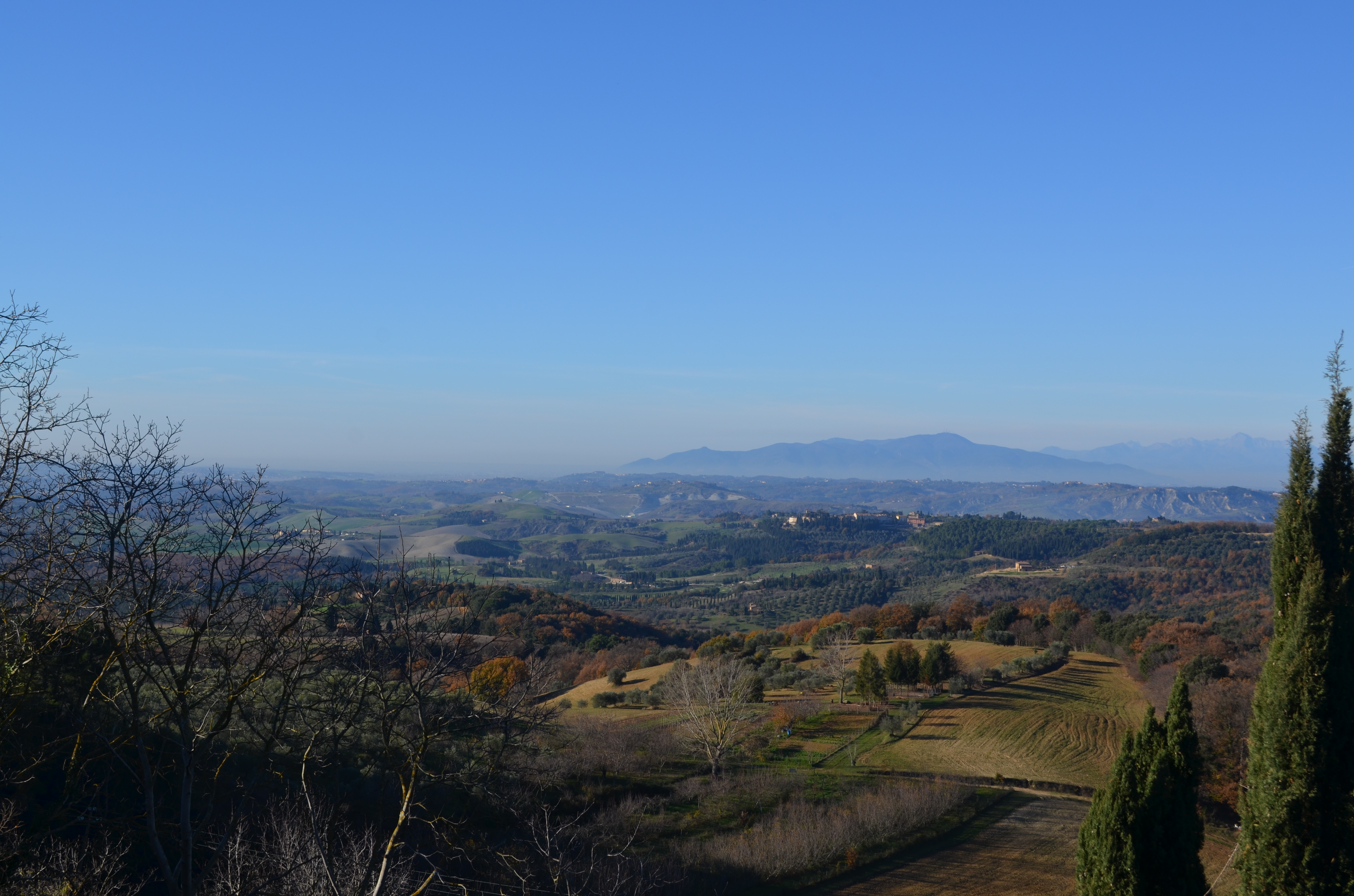 vista panoramica da San Vivaldo in direzione Monte Serra e Pisa